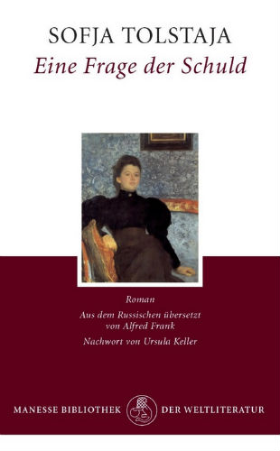 Sofja Tolstaja: Eine Frage der Schuld. Manesse Verlag, Zürich 2008. DNB